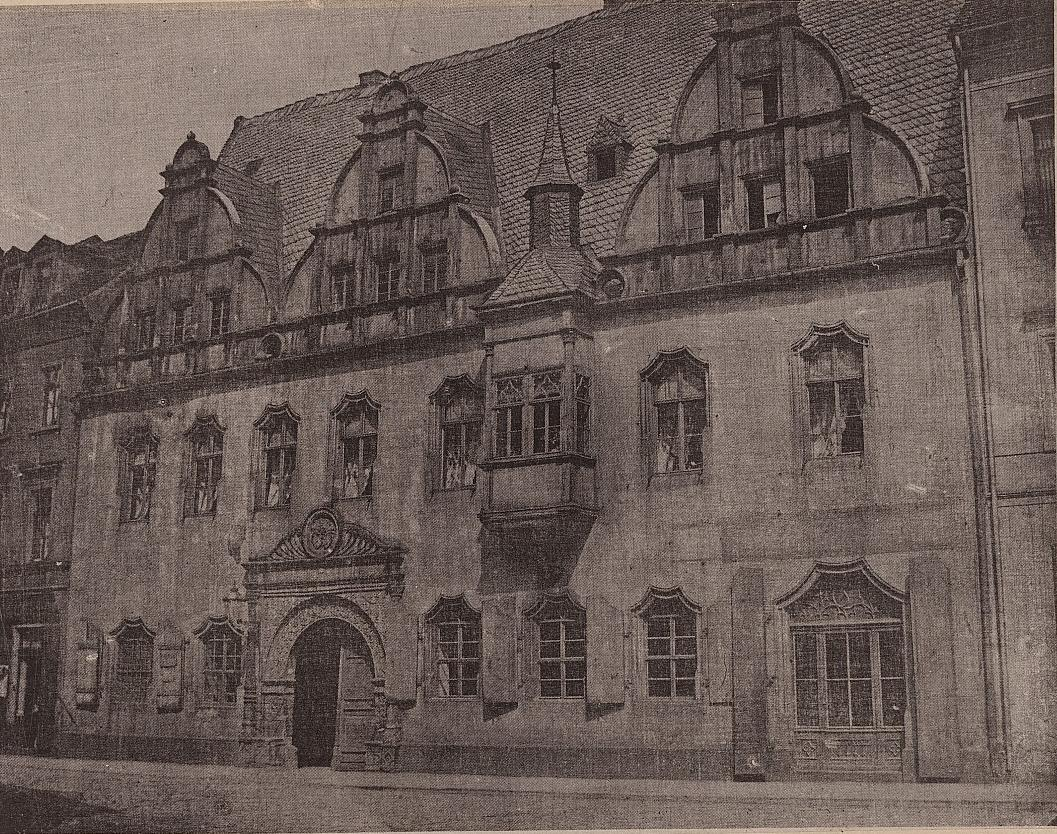 Ansicht der Ratsschulbibliothek in Zwickau, Lithographie, um 1880 [Dresden] : [Römmler & Jonas], [um 1880]. - 1 Kunstbl. : Lithogr. ; 22 x 17 cm